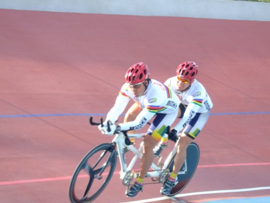 tandem de pista